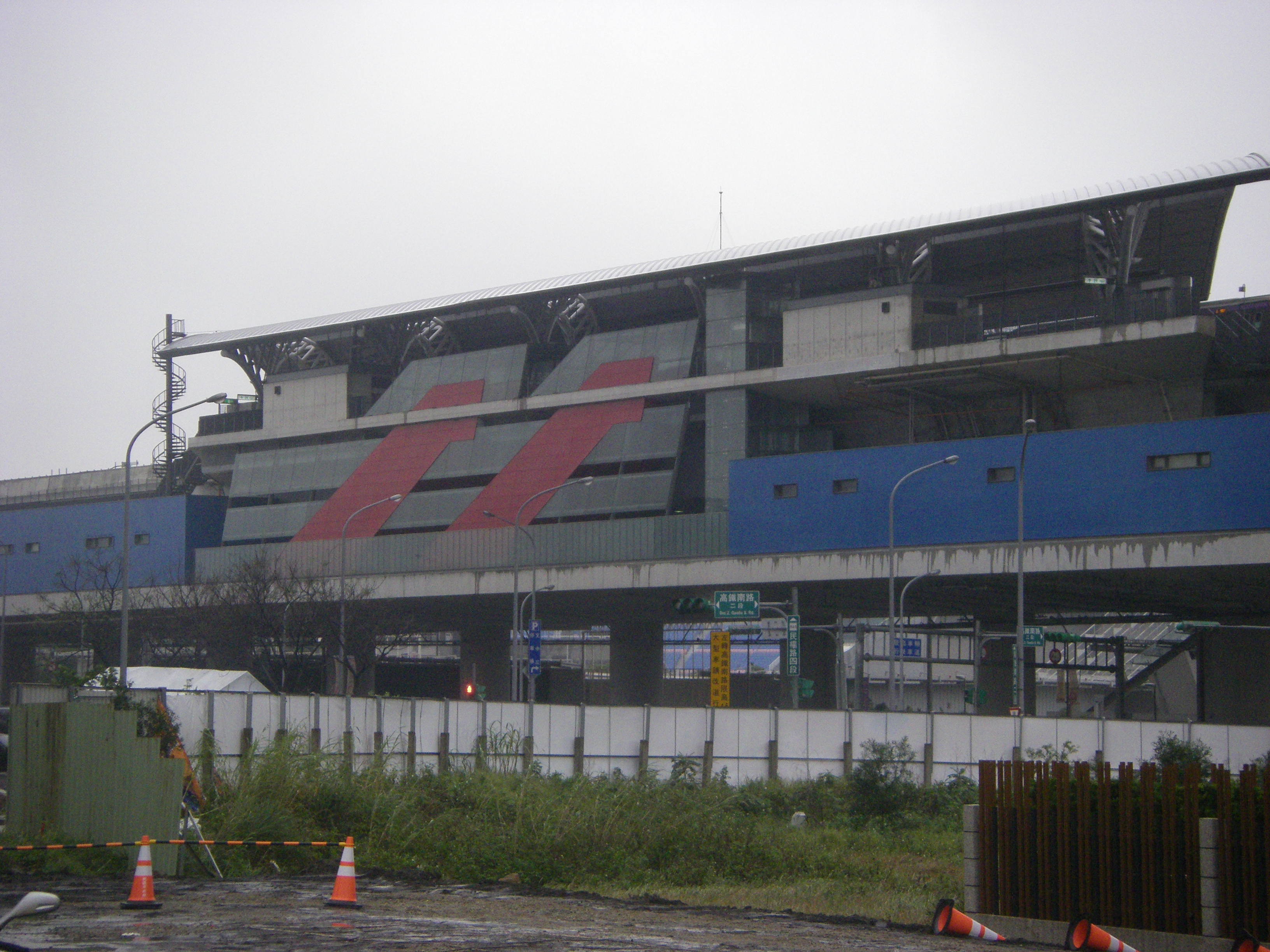 中文（台灣）: 桃園捷運藍線的桃園體育園區站